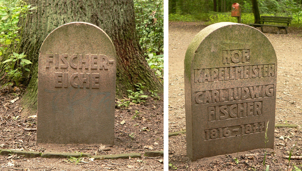 Gedenkstein Fischereiche